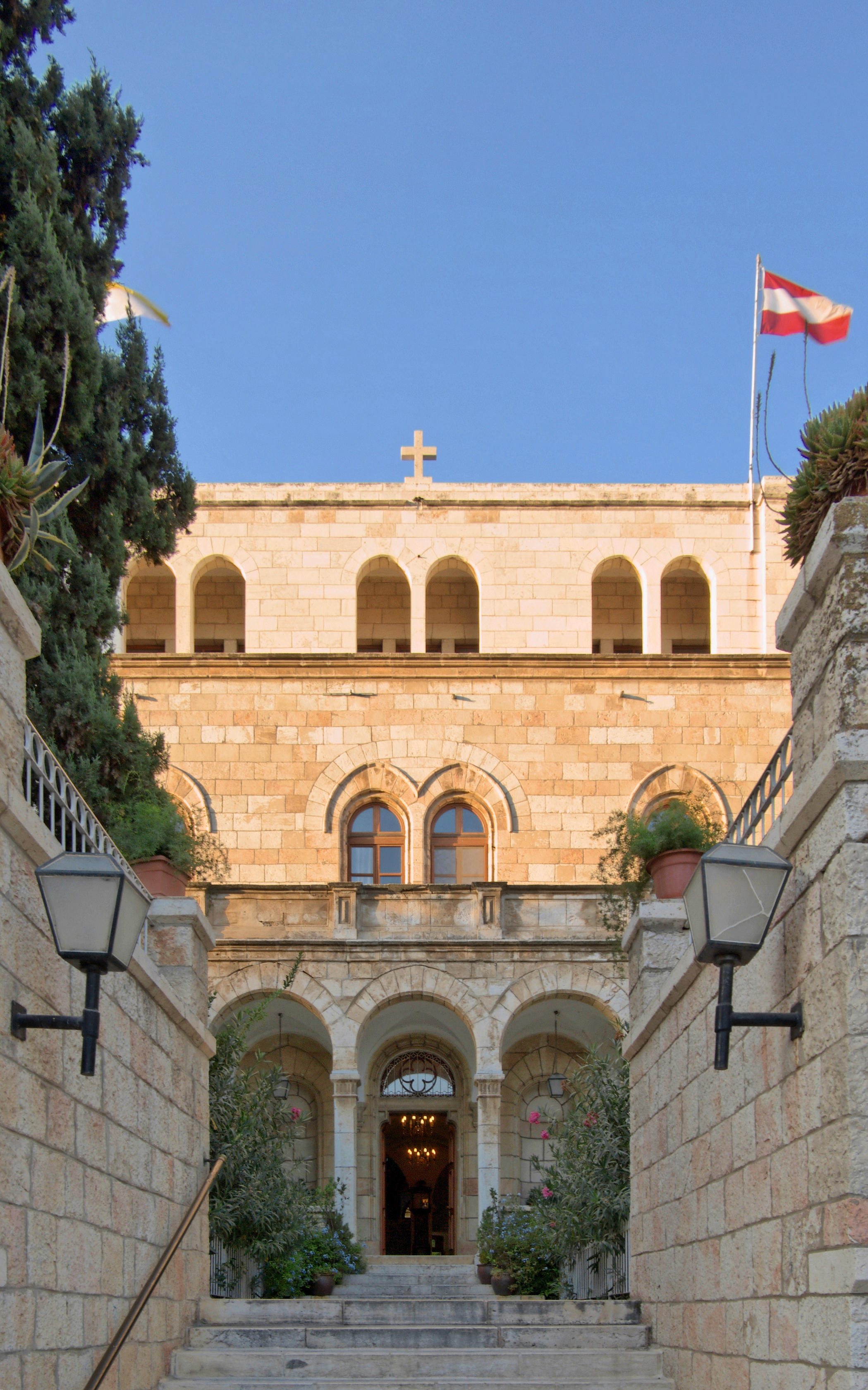 Österreichisches Hospiz in Jerusalem